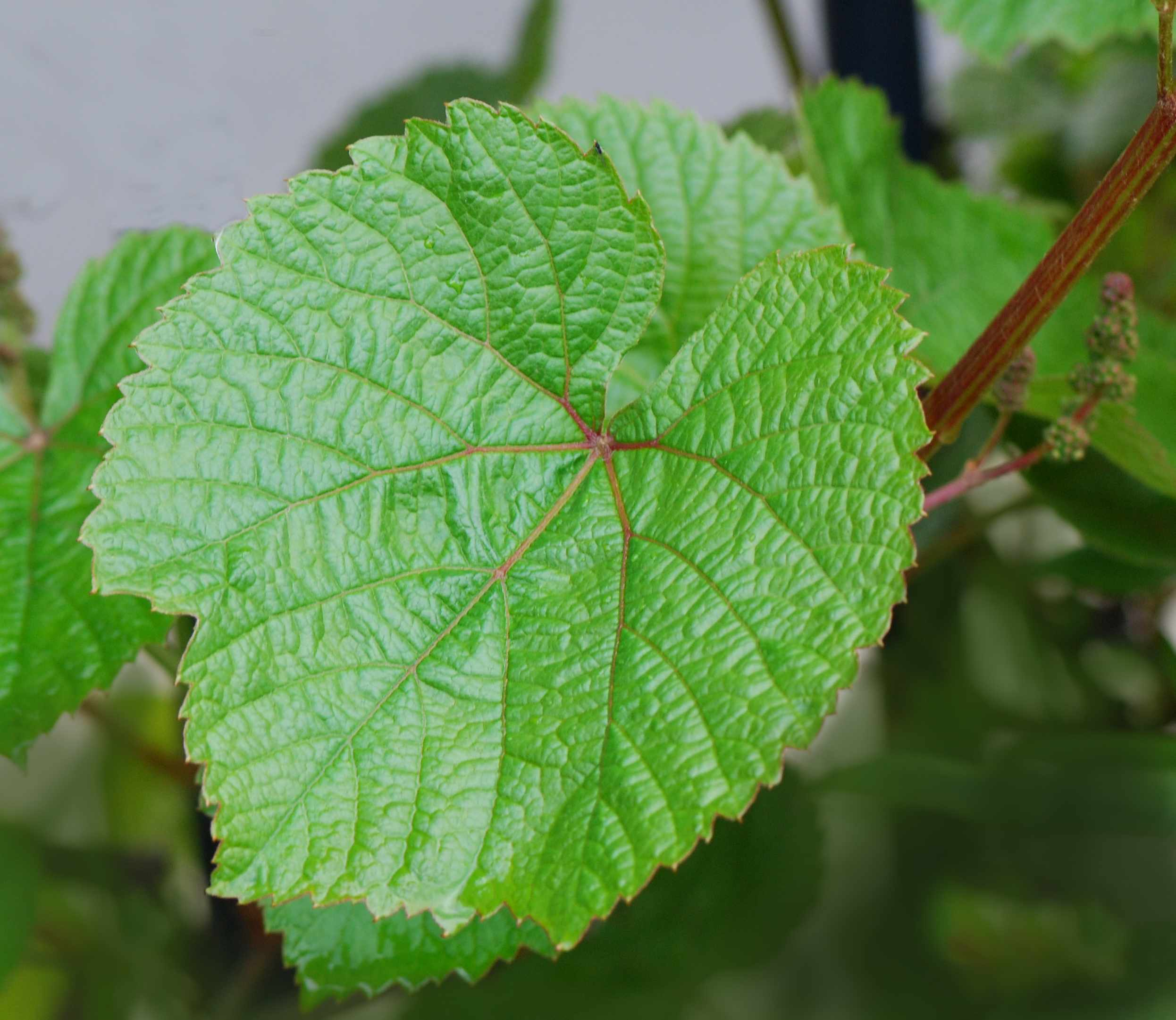 Vitis coignetiae, feuille, Paris